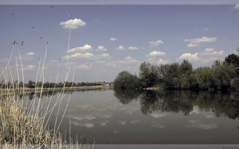 Ponjavica